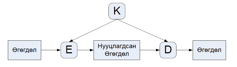 Монгол: Дундын түлхүүртэй алгоритм